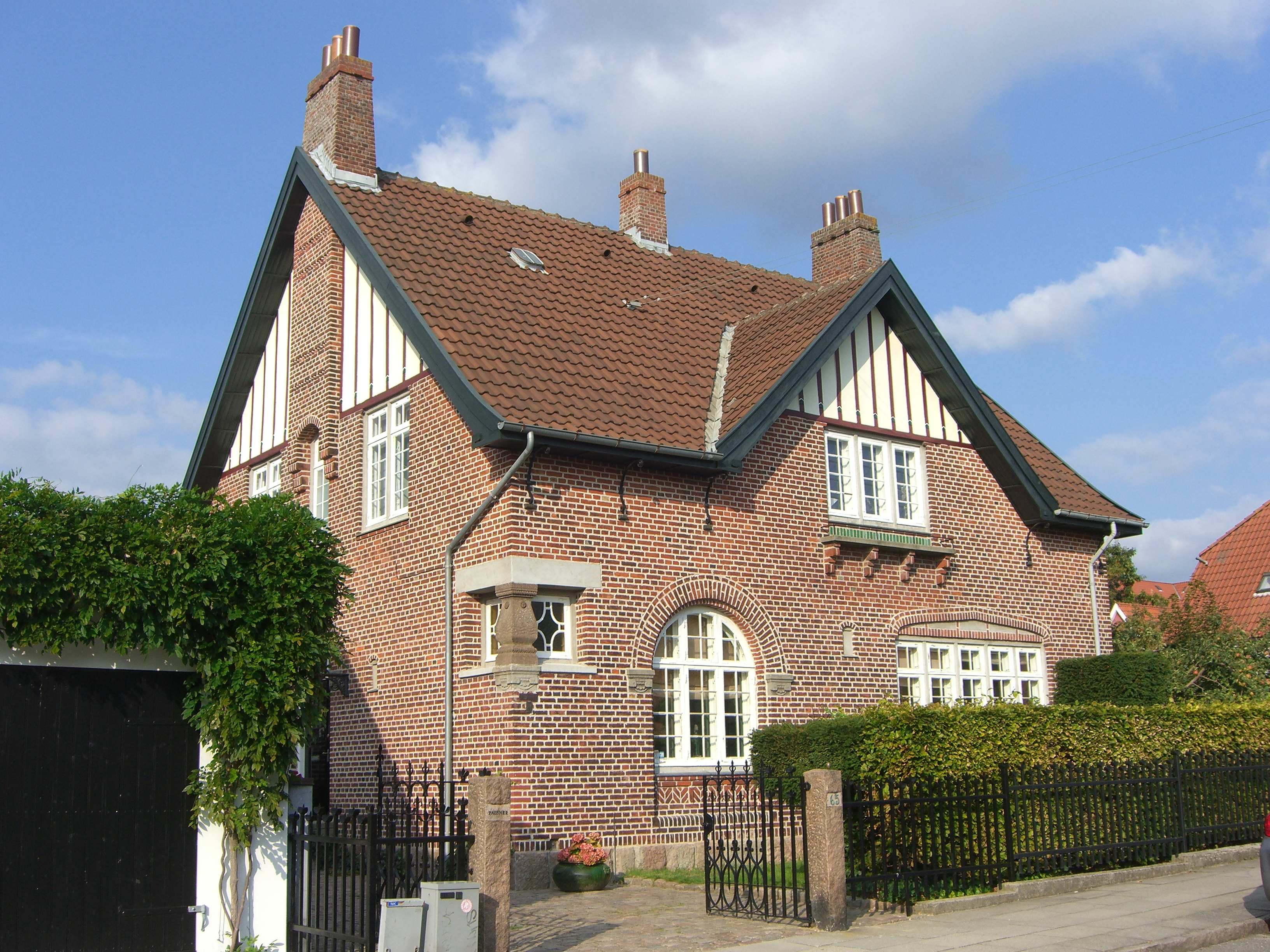 Nygårdsvej 65, 6700 Esbjerg, Danmark. Arkitekt: C.H. Clausen (1908)